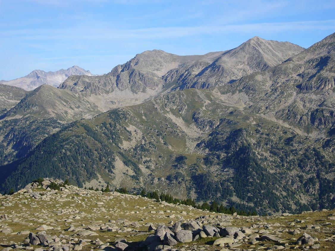 Coma de l'Estapiella vista des del Tuc del Coll Arenós, la Vall de Boí, Alta Ribagorça, Catalunya.